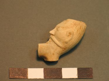 Krítarpípa frá Strákatanga.